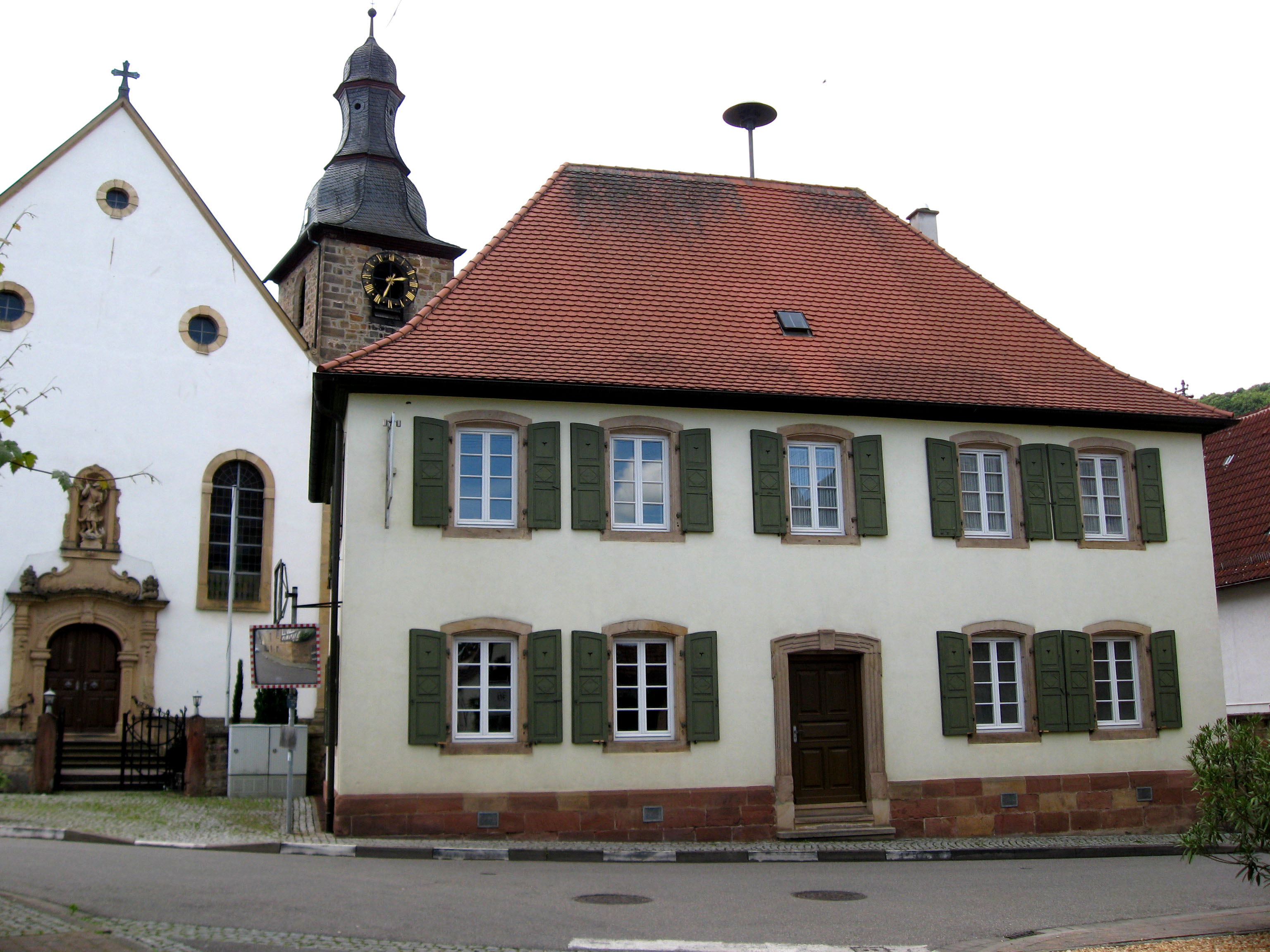 ehemalige Schule, Weinstraße 2 in Pleisweiler, Ortsteil von Pleisweiler-Oberhofen